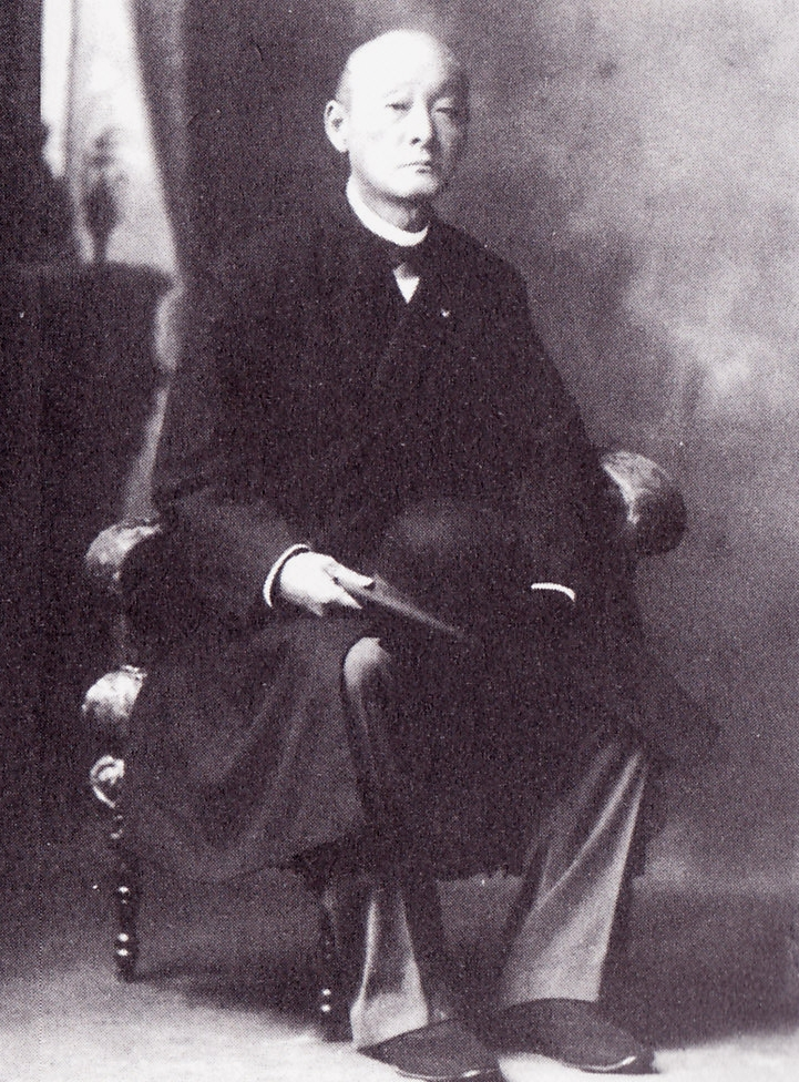 Count Matsura Akira(松浦詮)